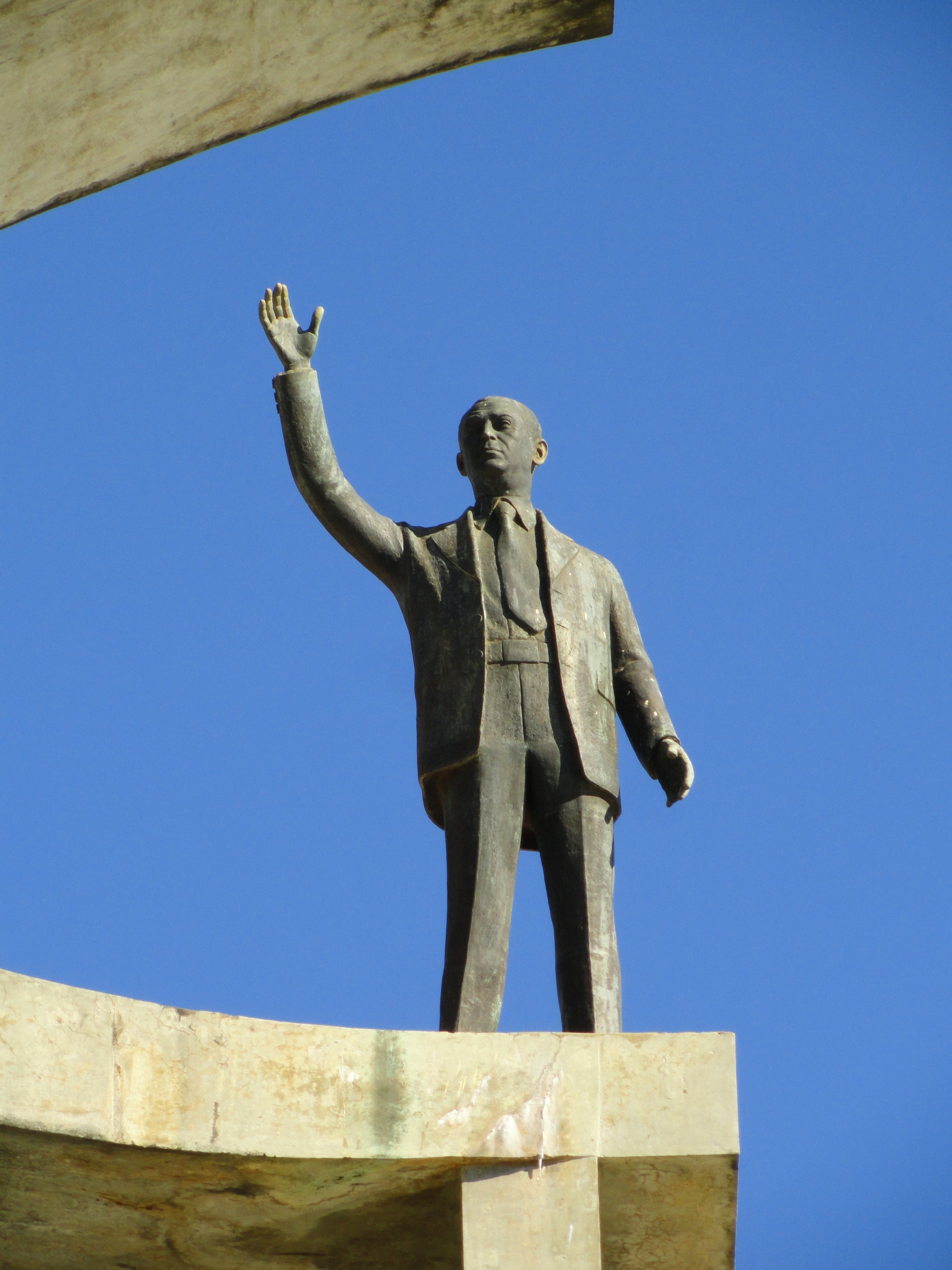 Memorial JK, Brasília, Brazil.